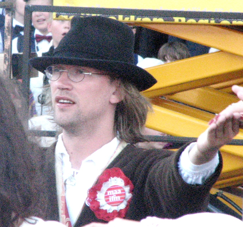 Märt Agu tantsimas XI noorte laulu- ja tantsupeol